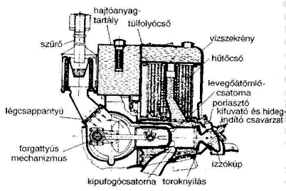 A HSCS cég izzófejes motorjának vázlata